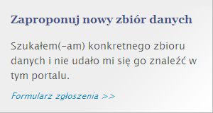 PL_box